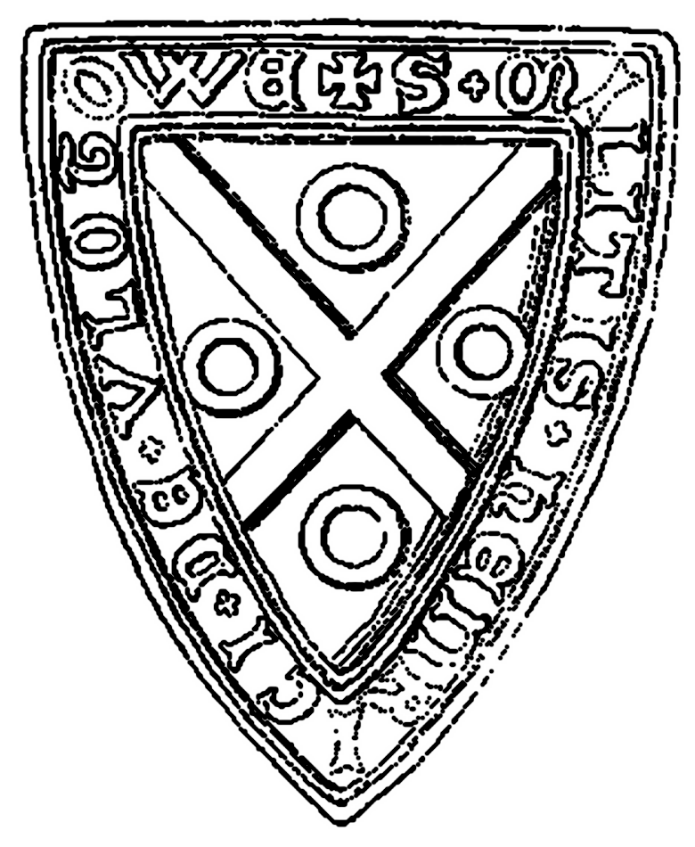 Wappen von Siegel des Heinrich von Flotow (S+[igillum] MILITIS hEnRICI DE VLOTOWE) von 1277.